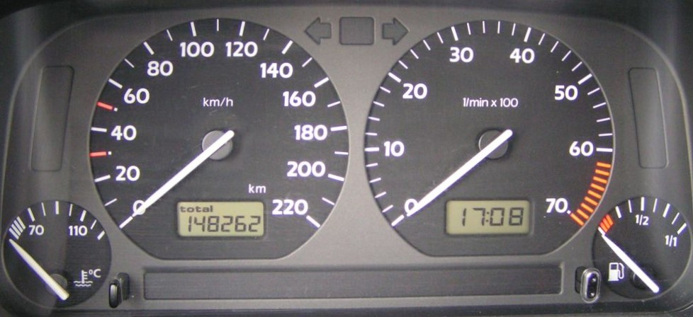 Tachometer_und_Drehzahlmesser_von_einem_Golf_3 selbstfotografiert GNU-FDL